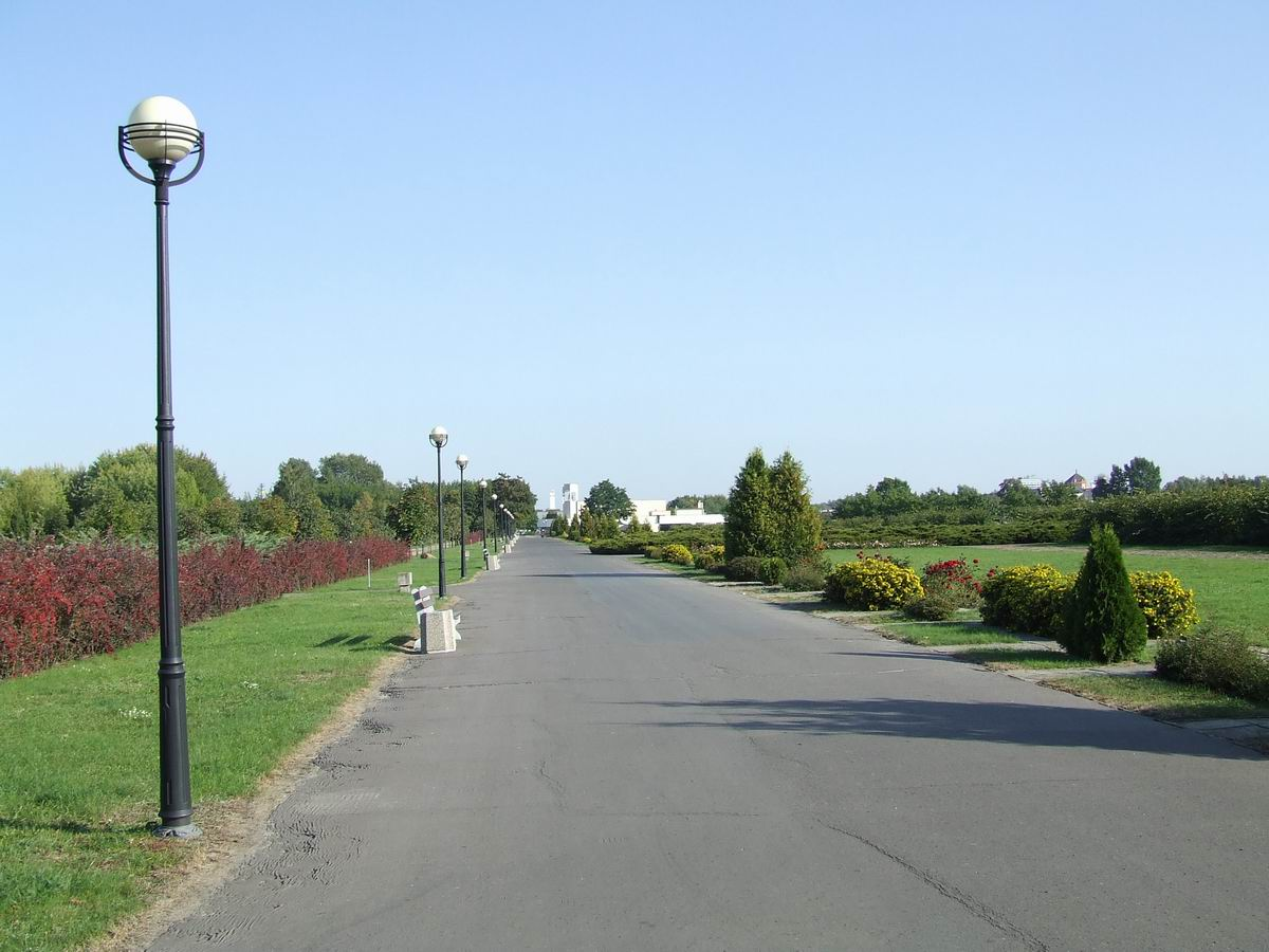 Jedna z głownych alejek na cmentarzu na Wólce Weglowej w Warszawie